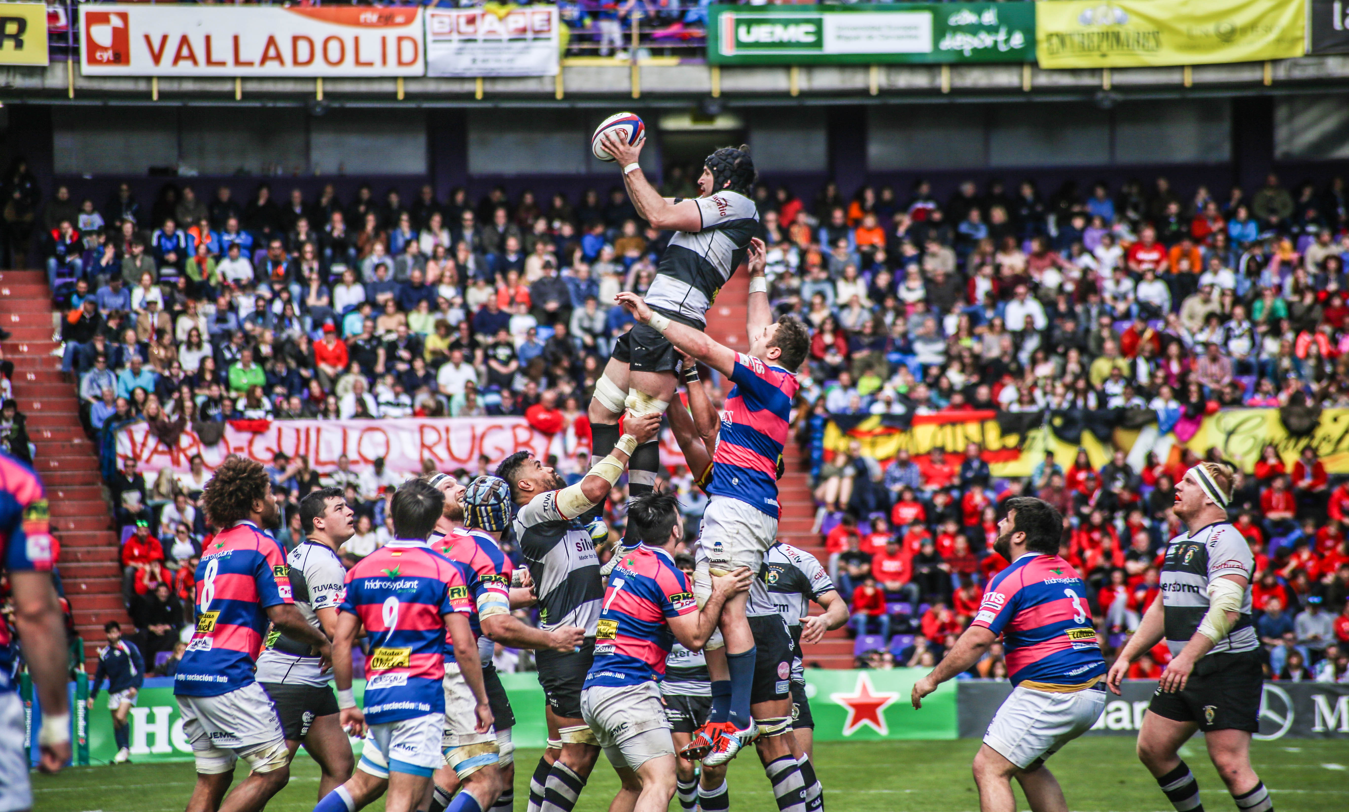 VRAC Quesos Entrepinares y El Salvador en la final de Copa de Rugby 2016